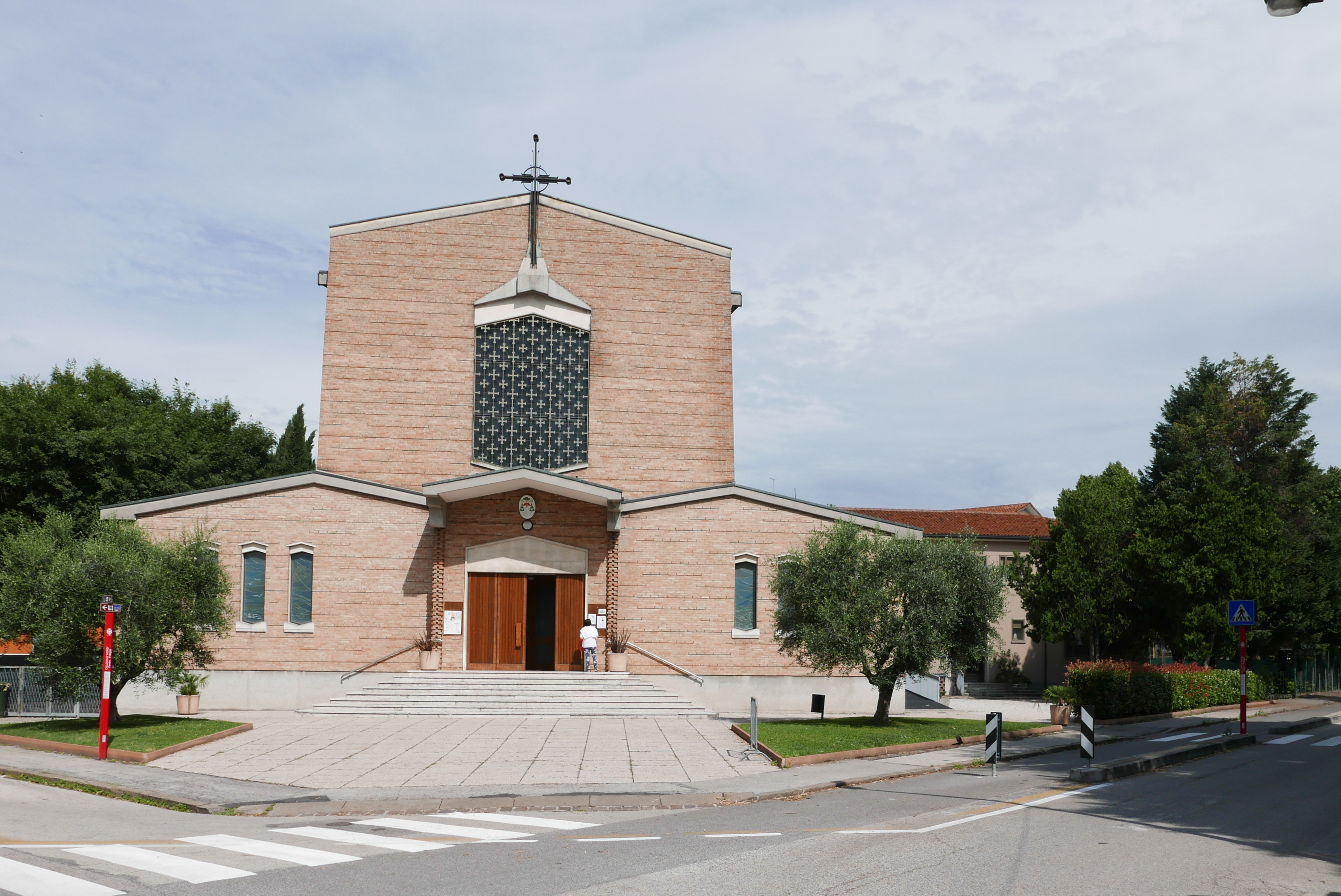 Chiesa parrocchiale del Cuore Immaolato di Maria, quartiere di San Bortolo a Vicenza